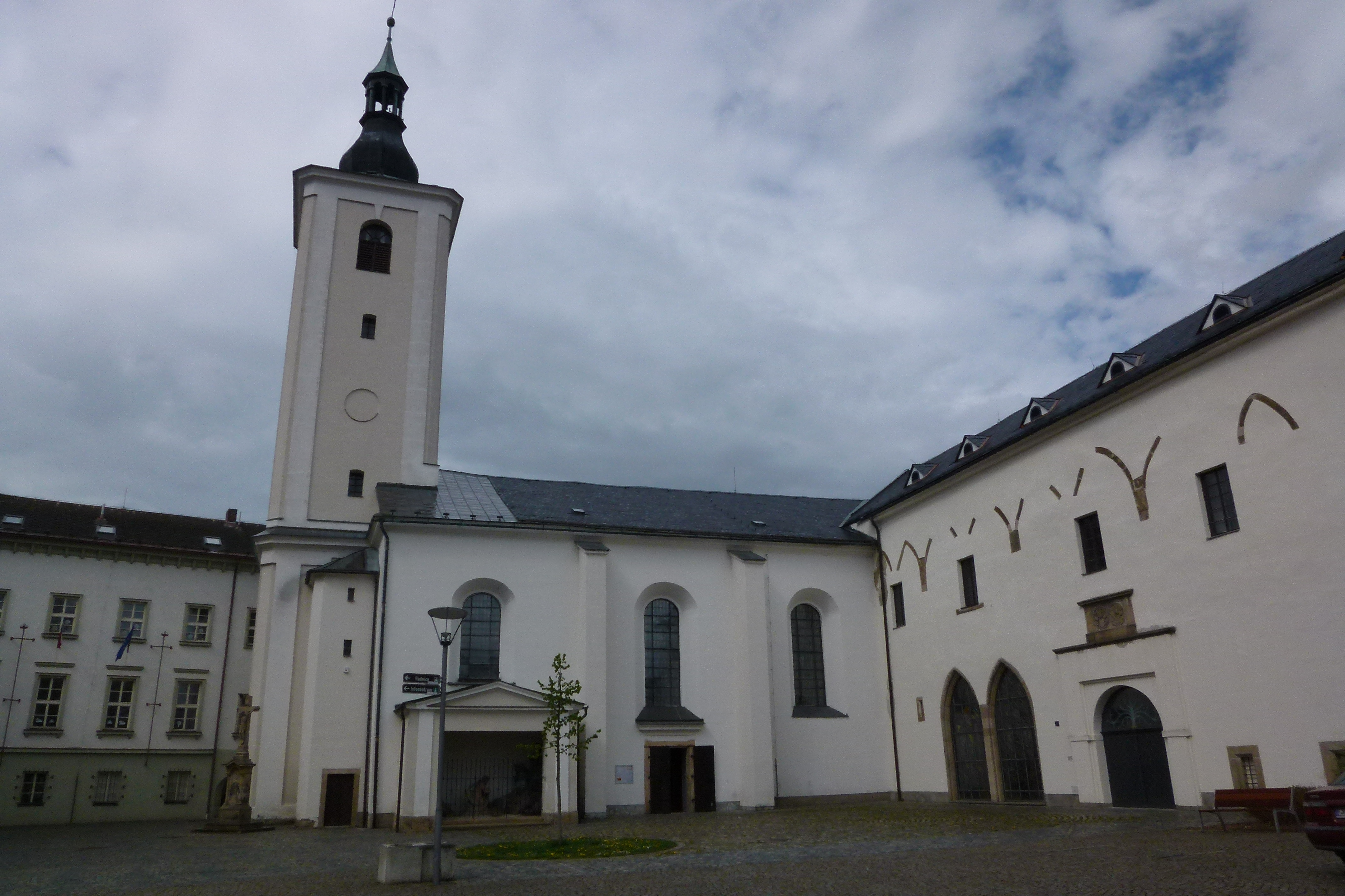 Kostel sv. Václava (pohled od nám. A. Jiráska)